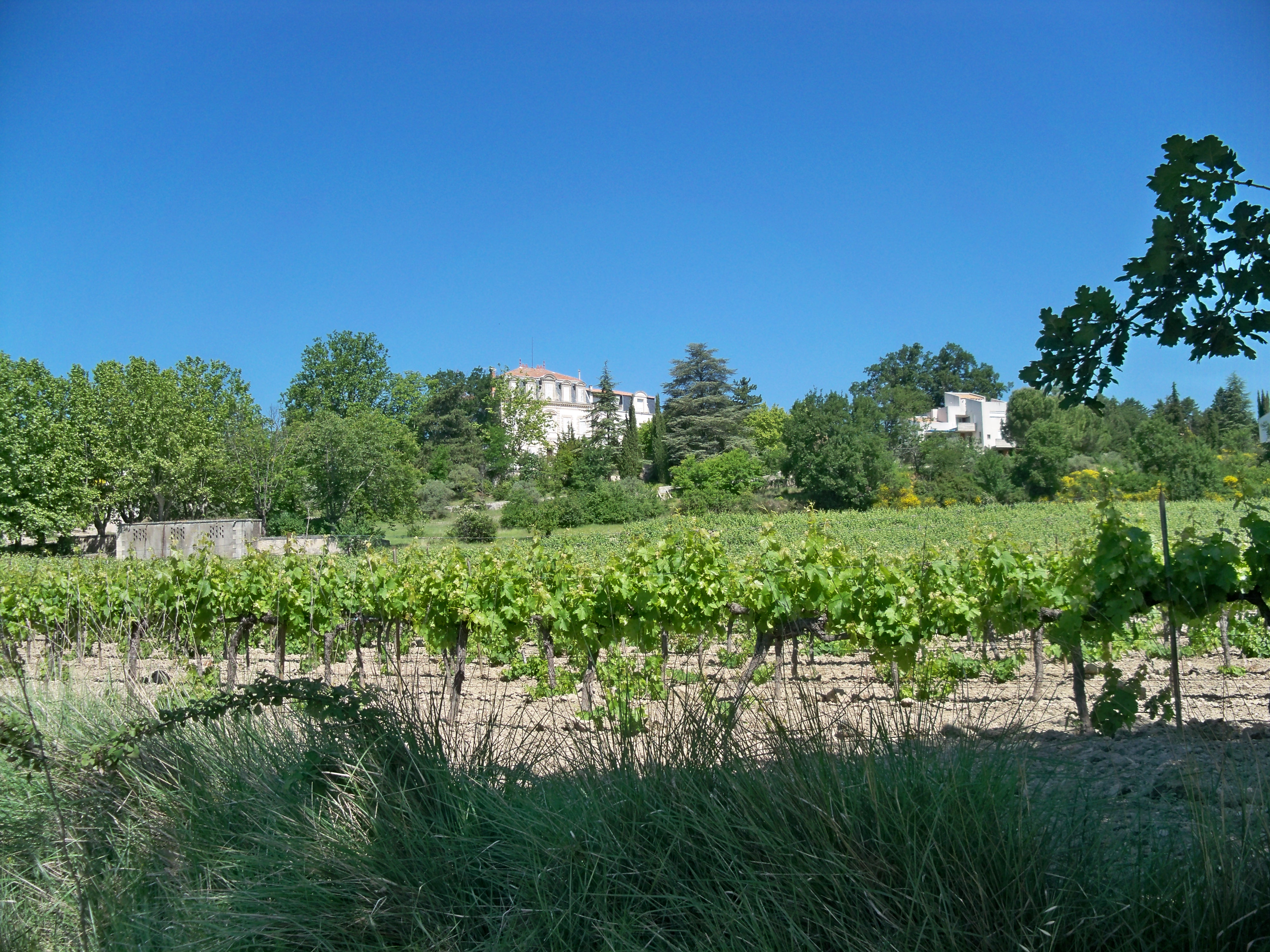 Vignes à Pierrevert (04), France